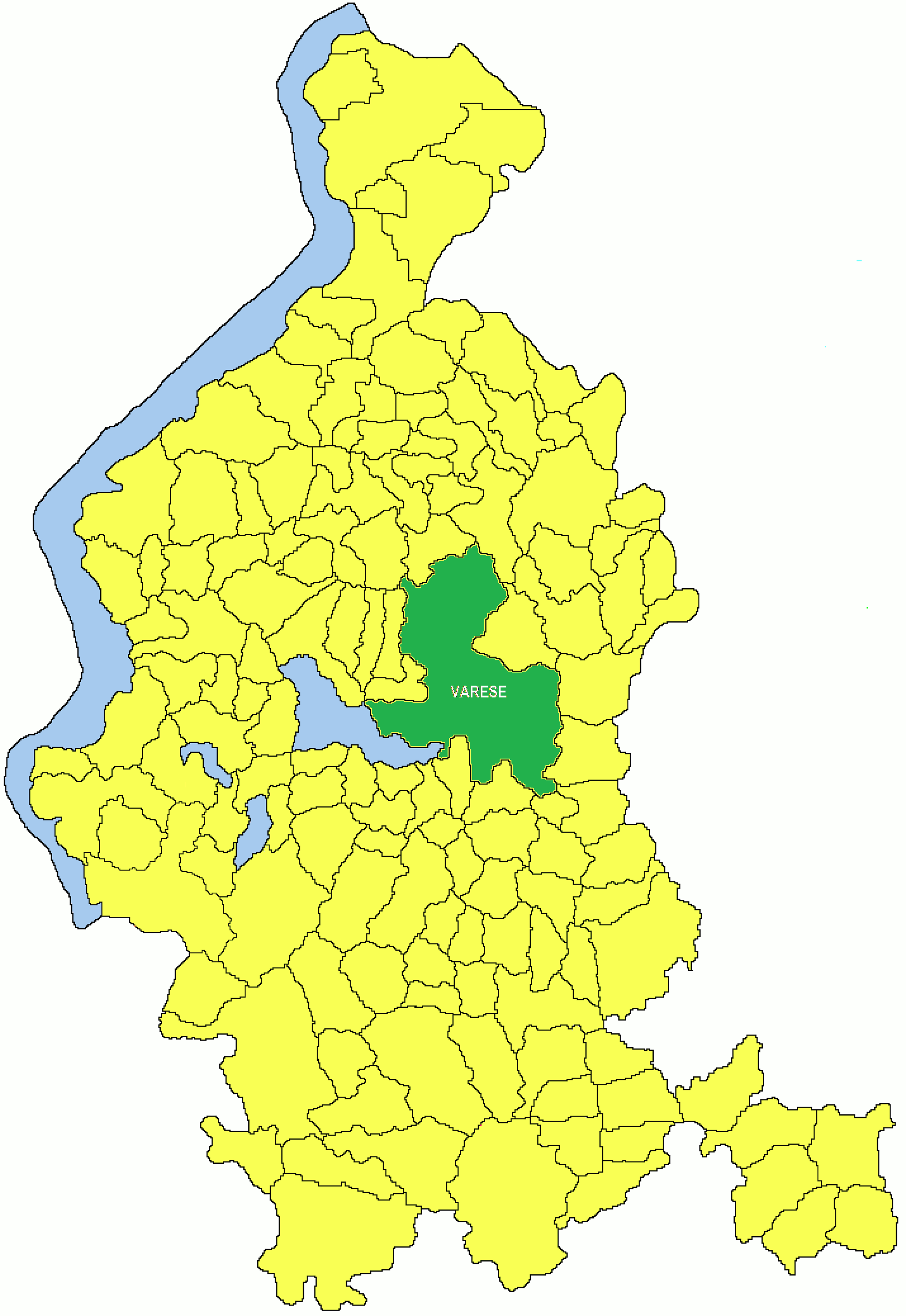 Mappa della provincia di Varese con indicati i confini comunali.